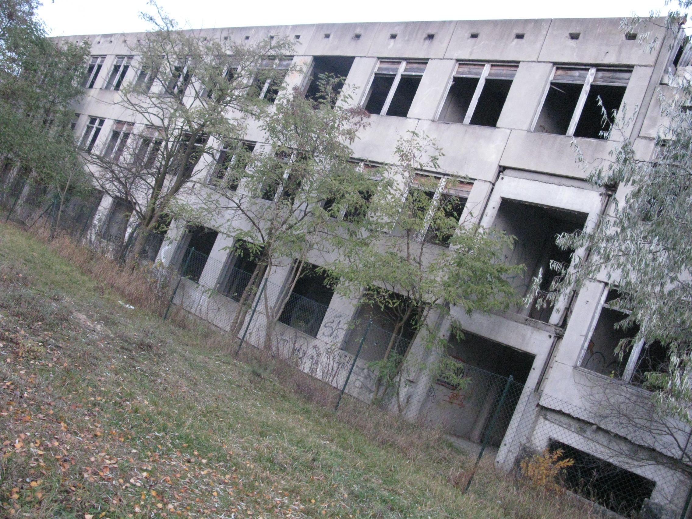 Nieukończona szkoła na osiedlu Bolesława Śmiałego w Poznaniu. Rozebrana w sierpniu 2013